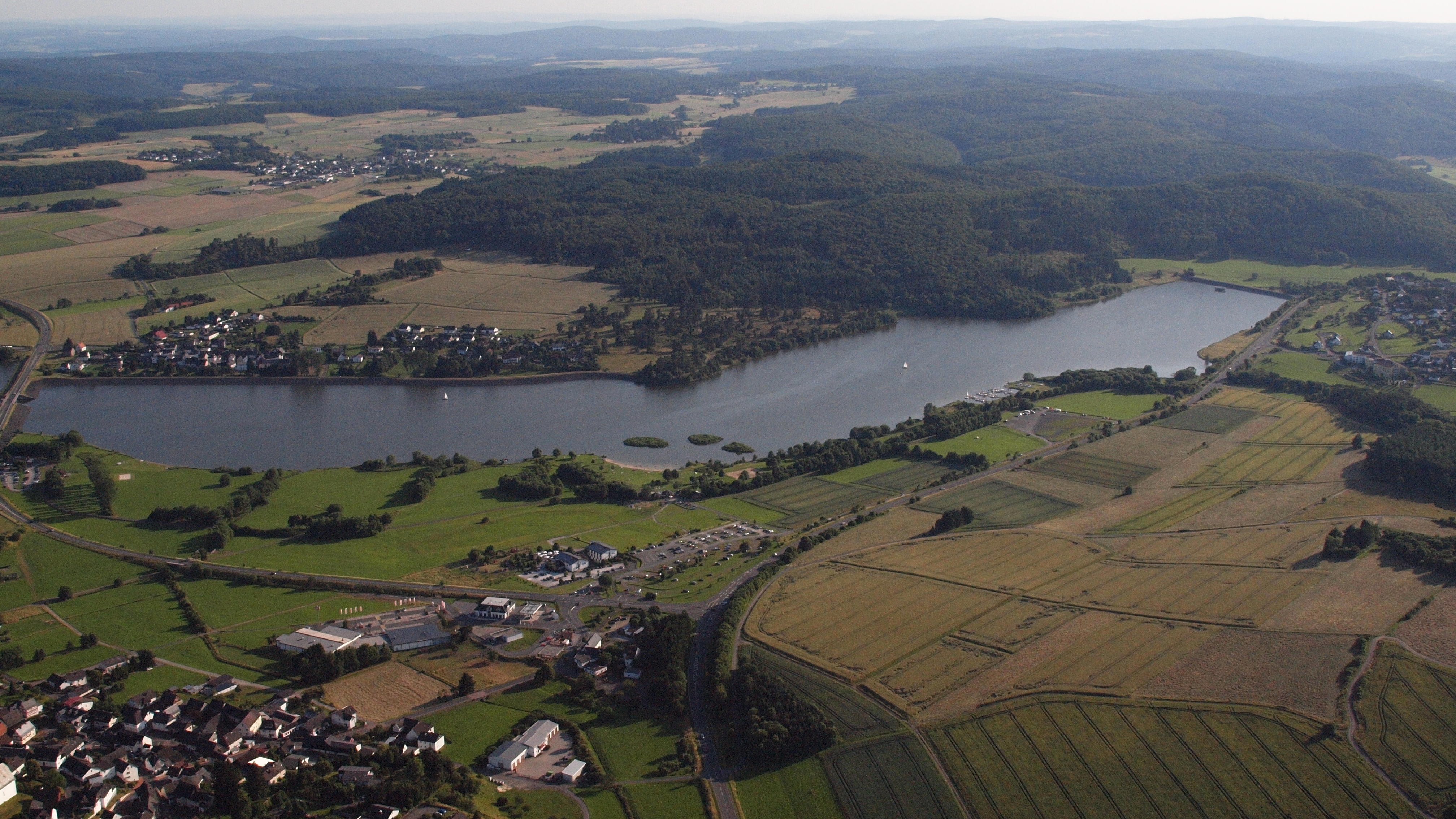 Aartalsperre: westlicher Teil, Luftaufnahme